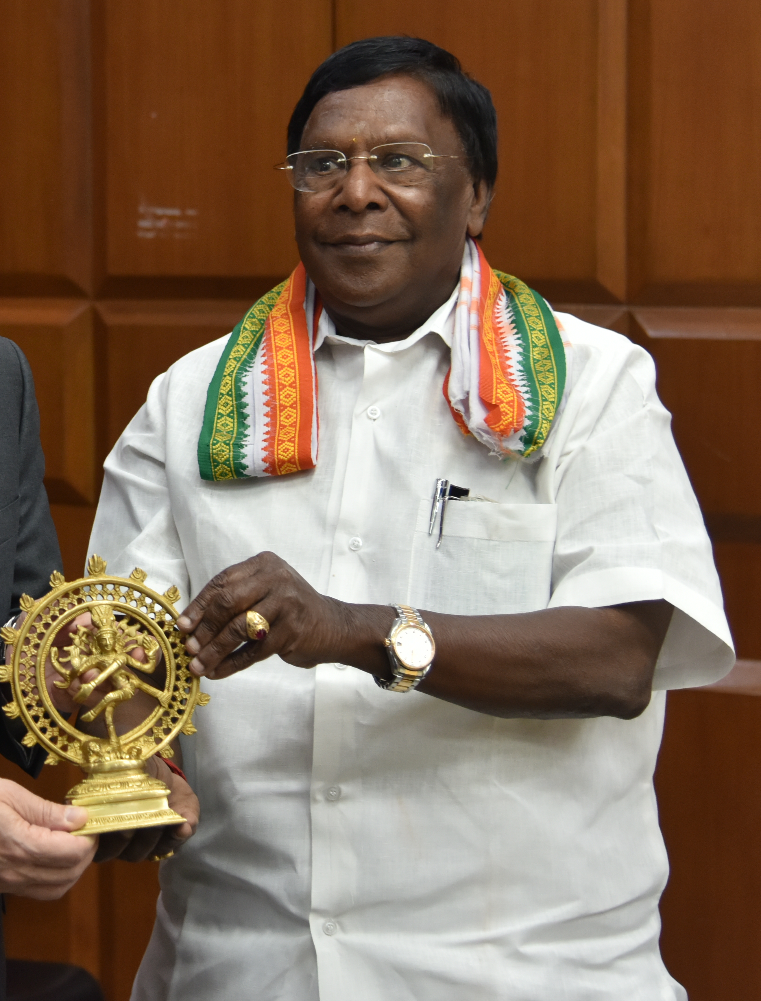 V. Narayanasamy with Ambassador Kenneth I Juster